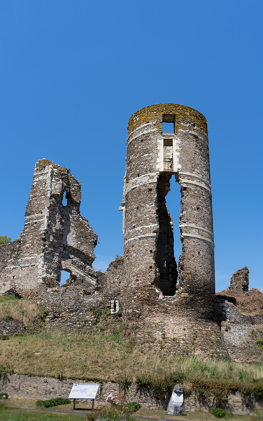 vue depuis la route